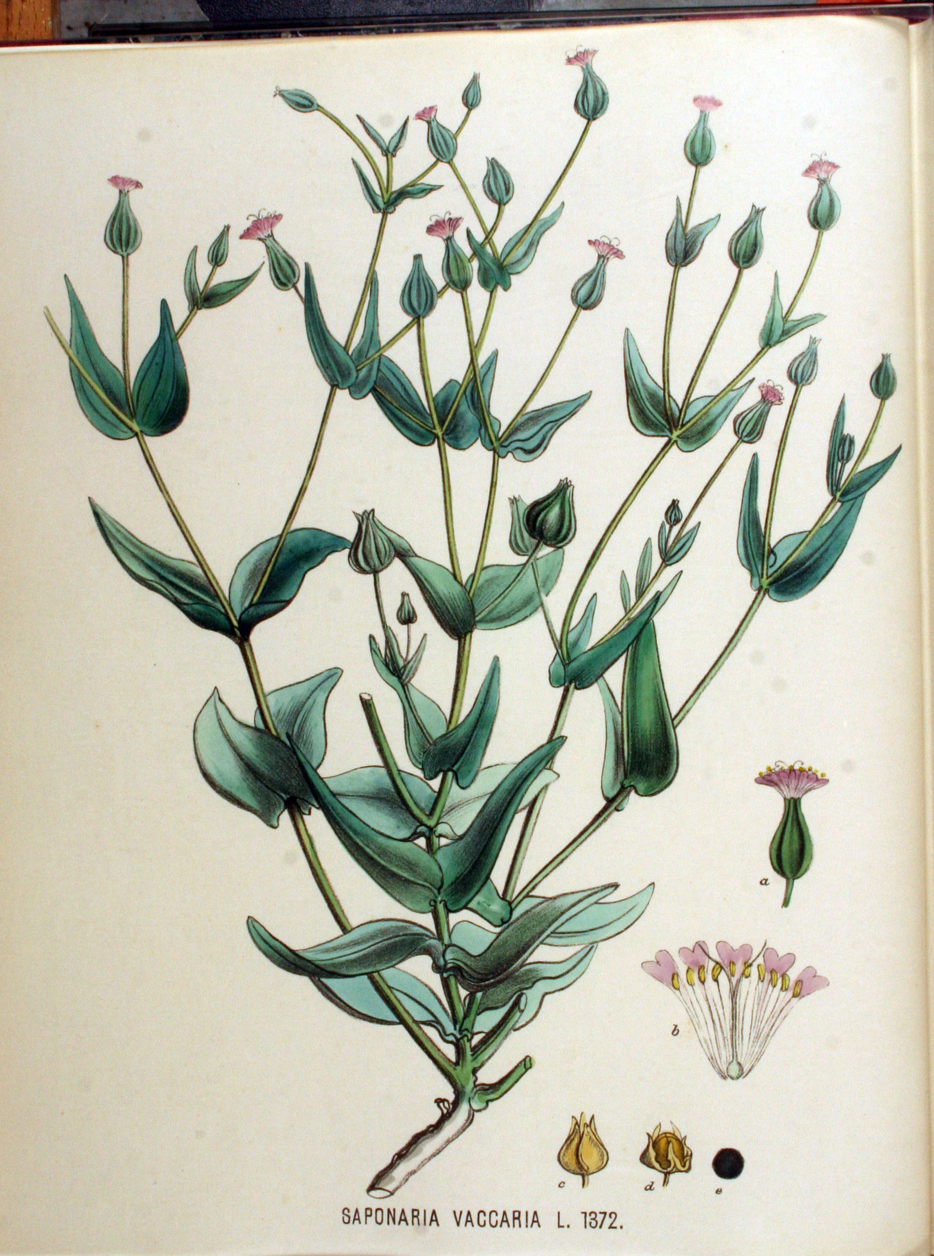 Vaccaria hispanica (Mill.) Rauschert (Syn. Saponaria vaccaria L.)